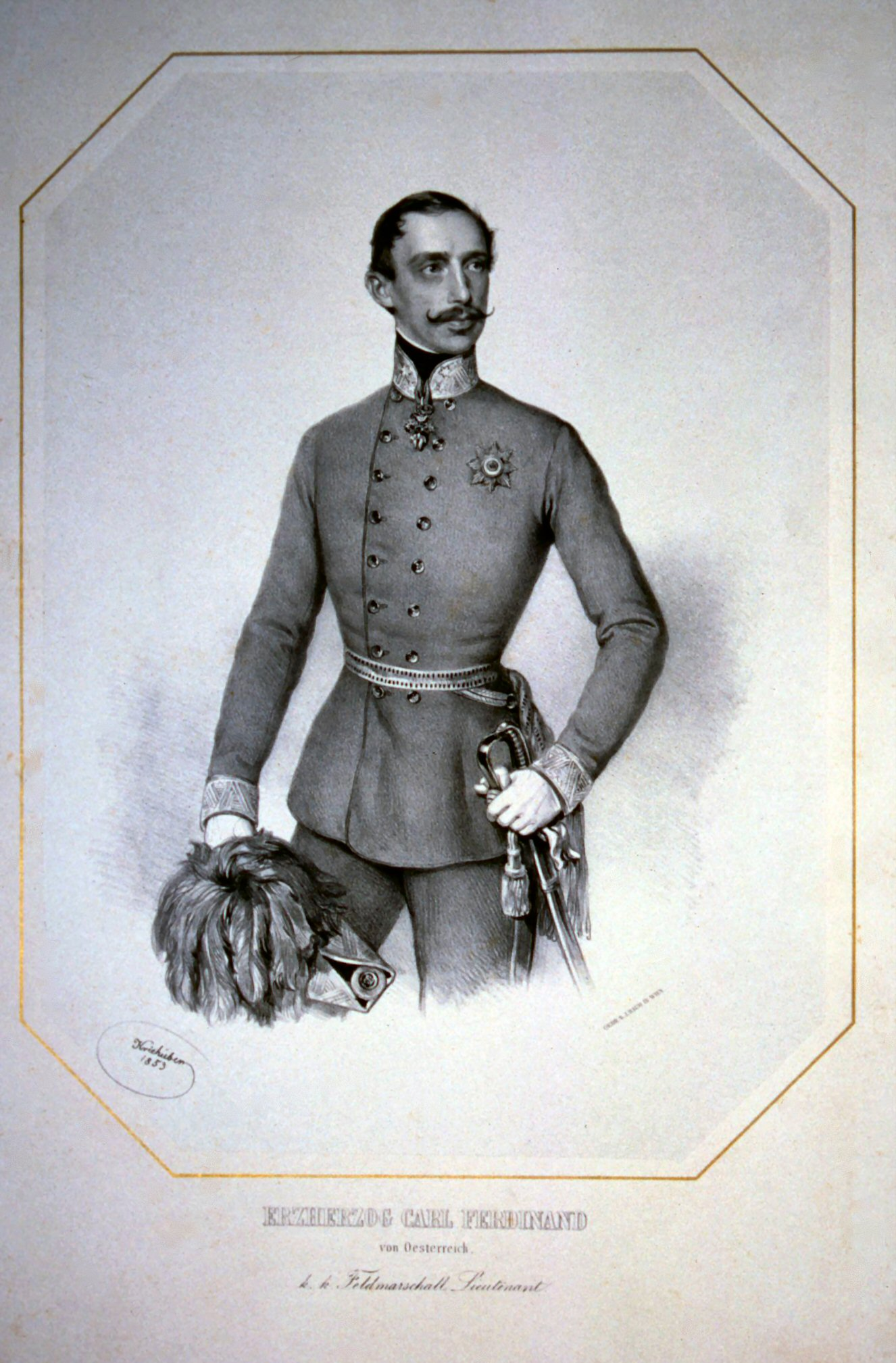 Karl Ferdinand von Österreich (1818-1874), Erzherzog, General der Kavallerie.Lithographie von Josef Kriehuber, 1853